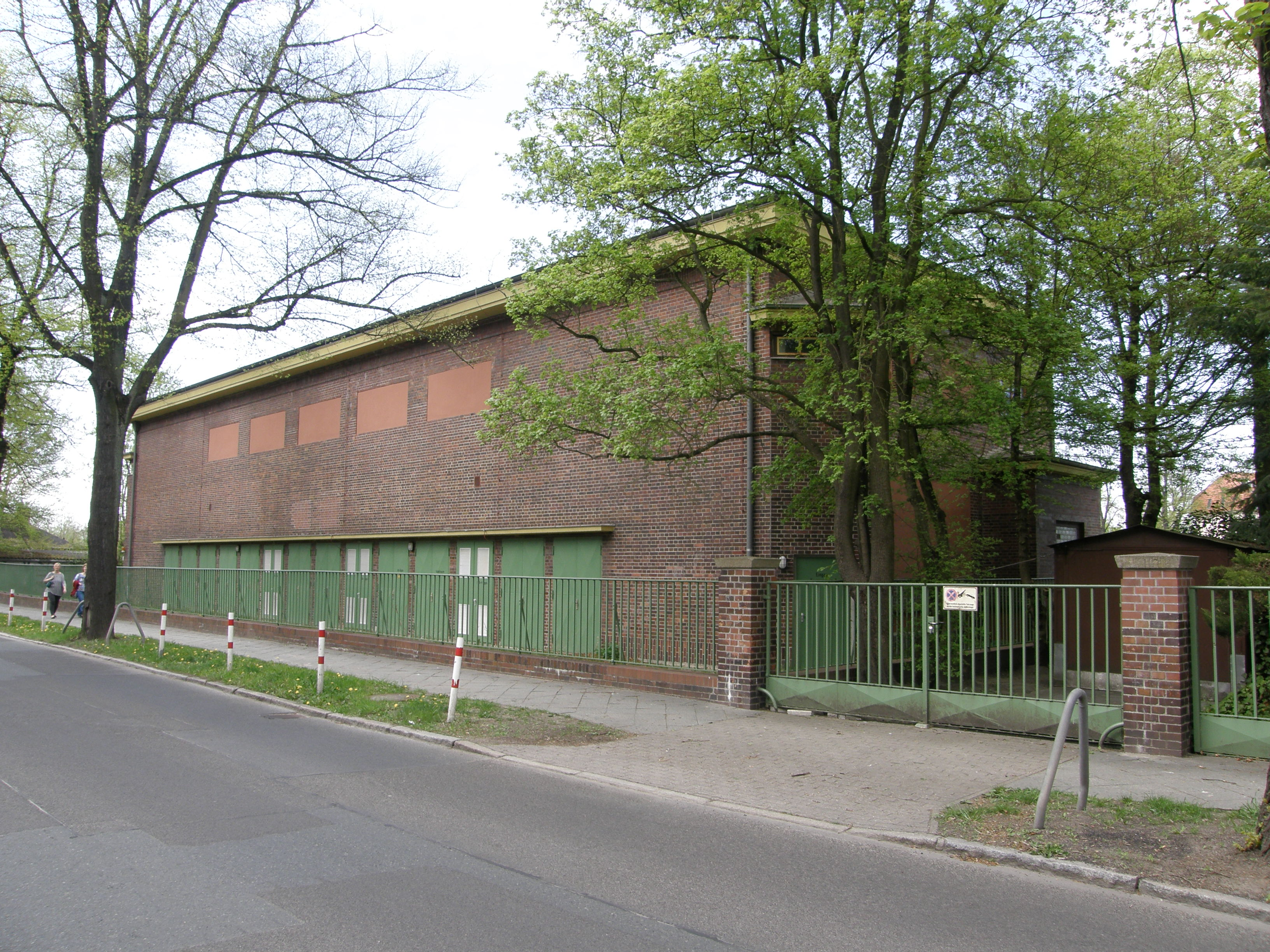 Berlin-Kaulsdorf, Baudenkmal Gleichrichterwerk